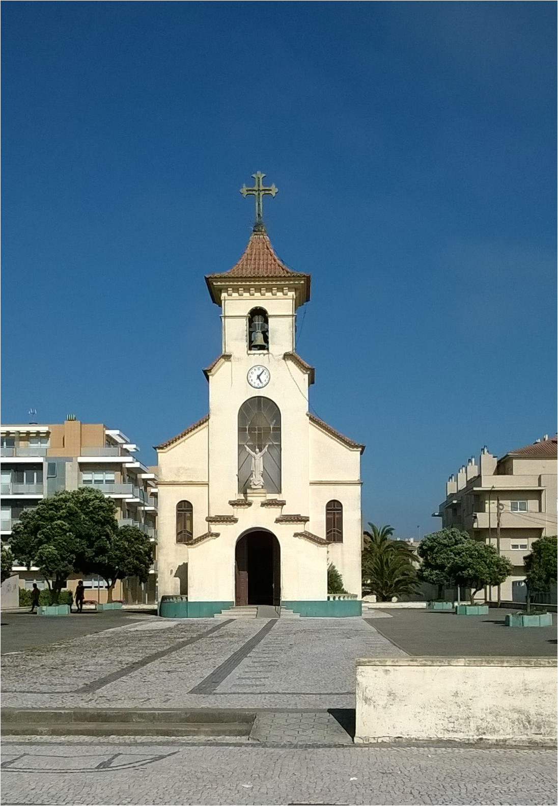 Capela da Praia, Esmoriz, concelho de Ovar, distrito de Aveiro, Portugal.